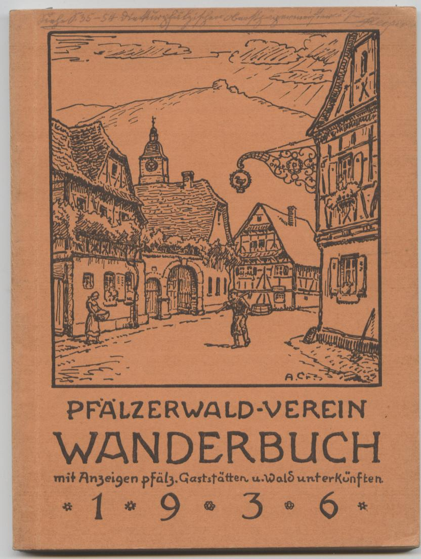 August Croissant, Buchcover mit einer Zeichnung von ihm